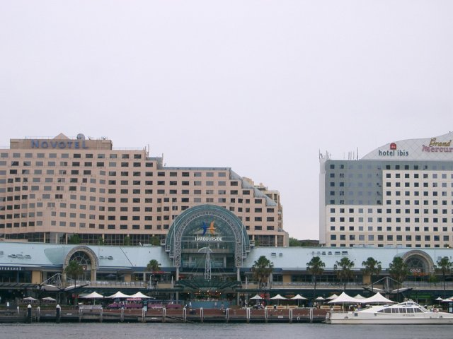 Darling Harbour